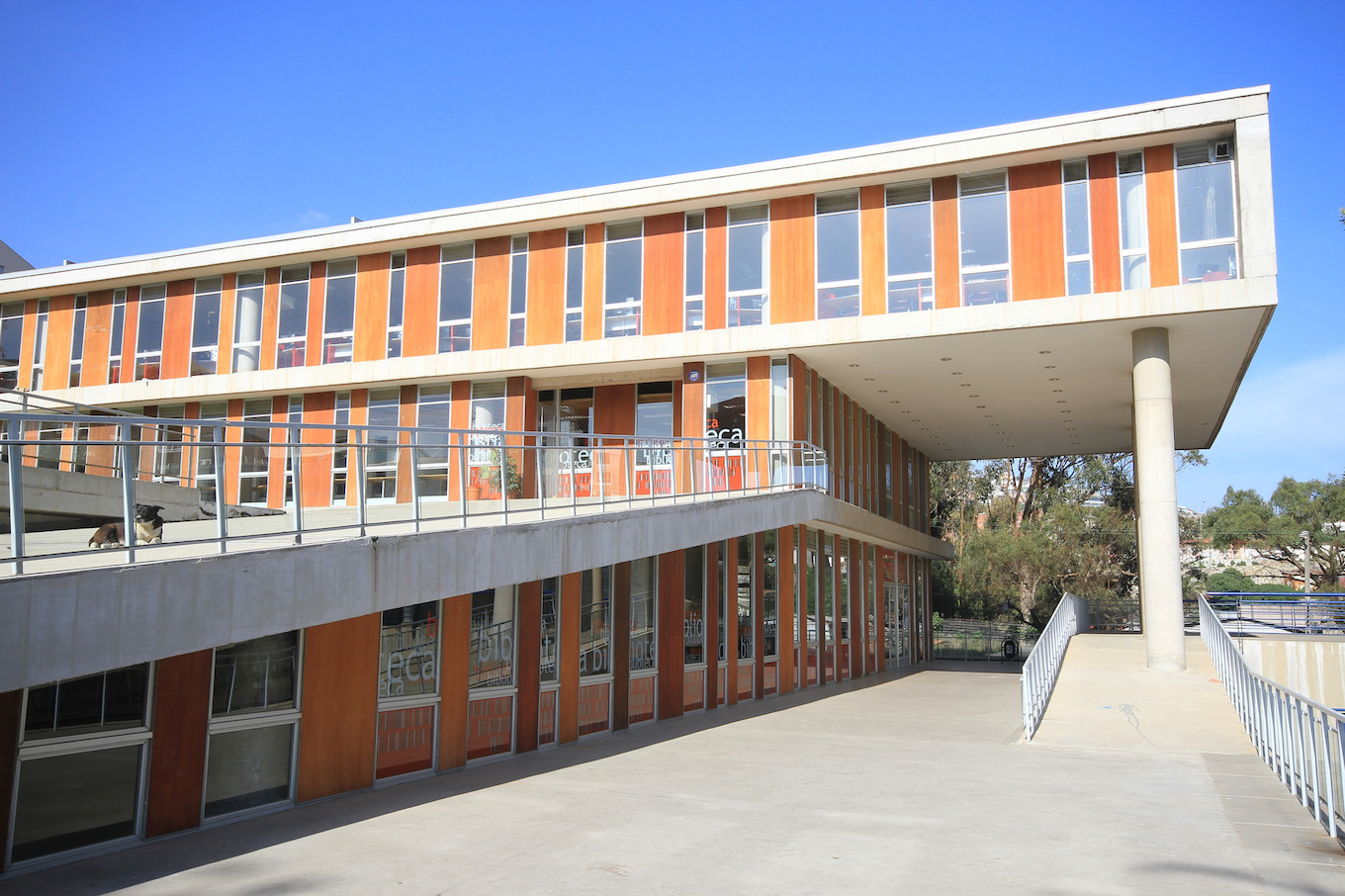 Biblioteca UPLA